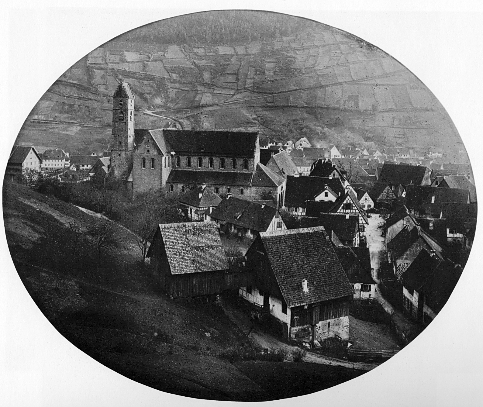 Alpirsbach, 1881, Baudenkmale 9, Alpirsbach Klosterkirche 198*240 mm